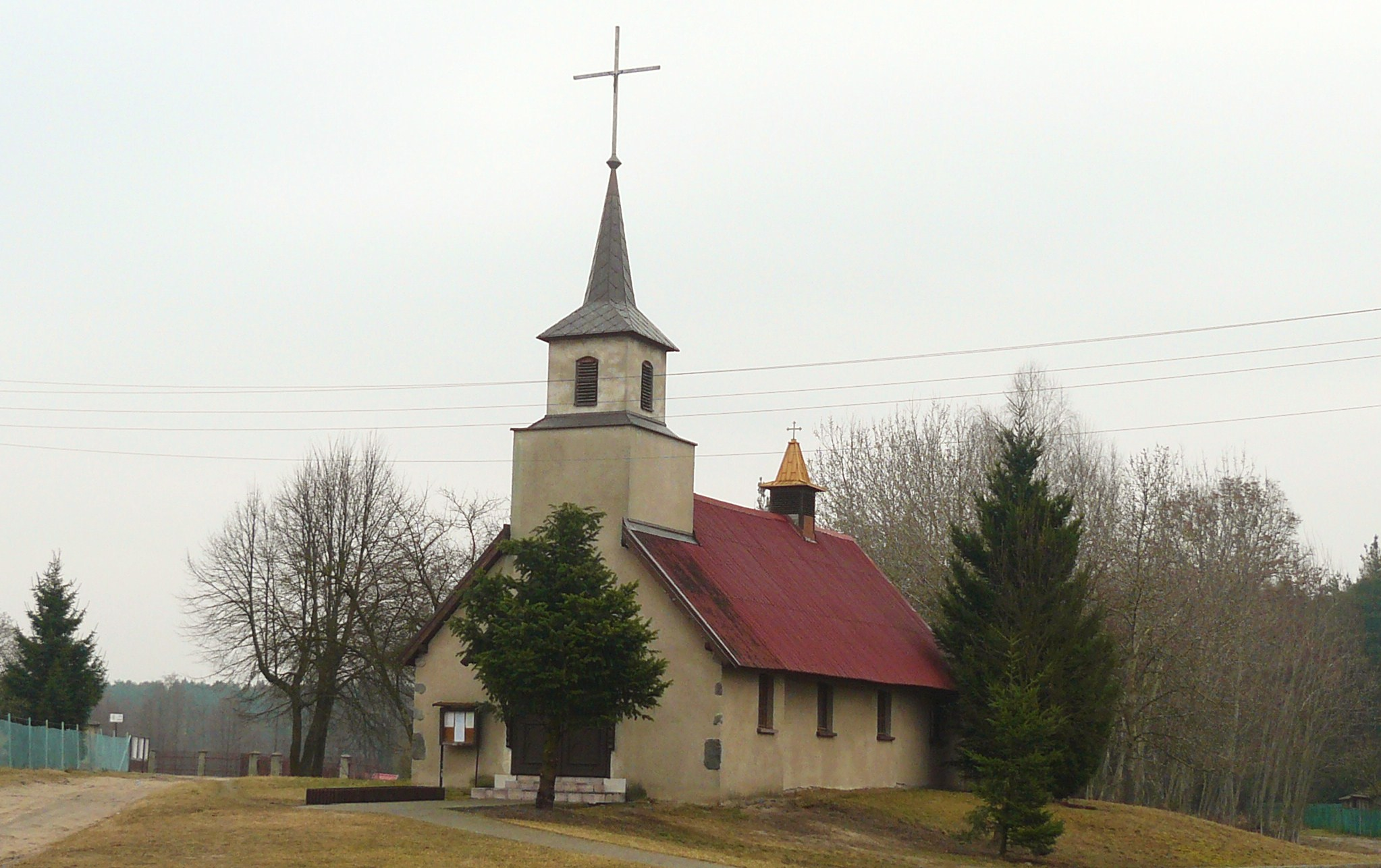 Kamiennik, gm. Drawsko.